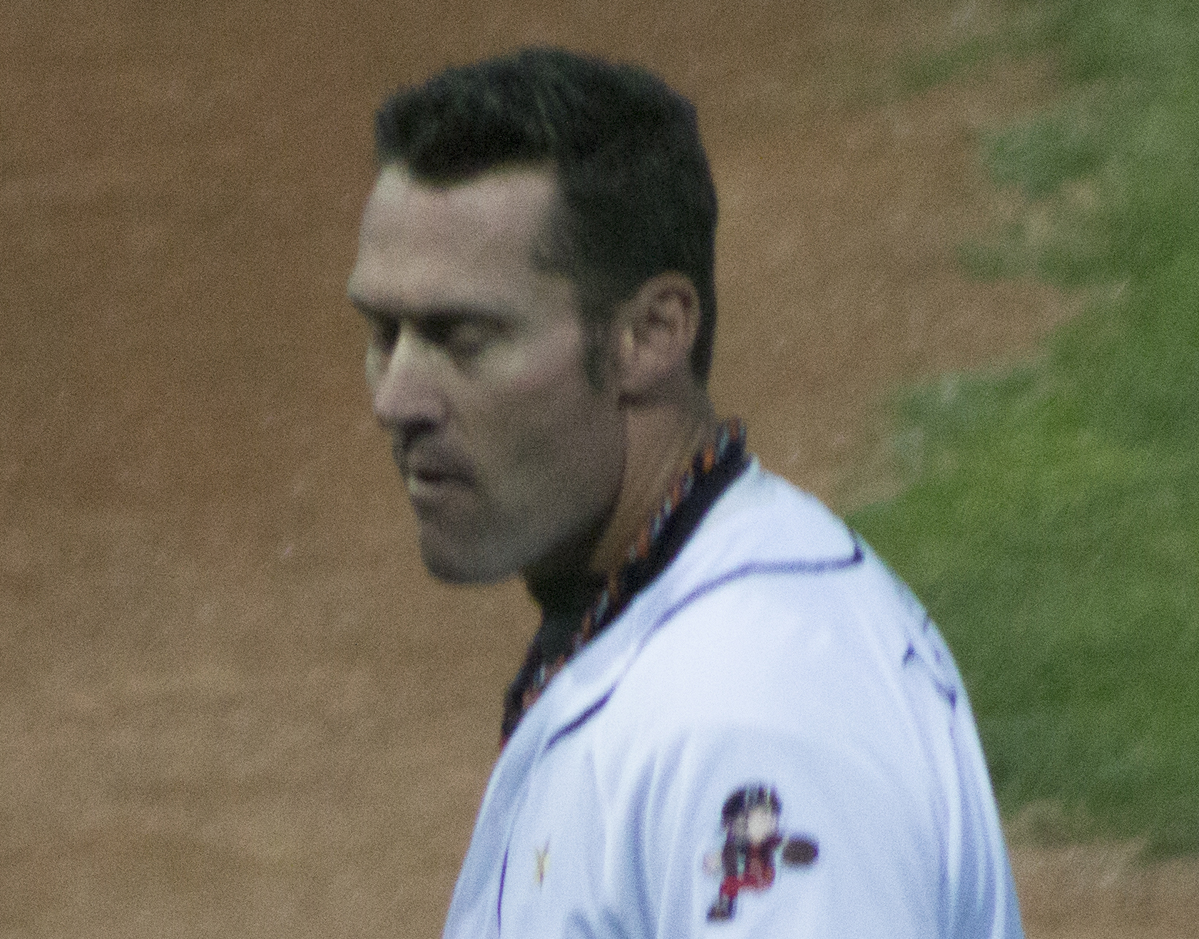 James "Jim" Buccheri durante San Marino-Rimini, gara valida per l'Italian Baseball League 2013. Foto scattata da me dagli spalti con obiettivo 70-300.